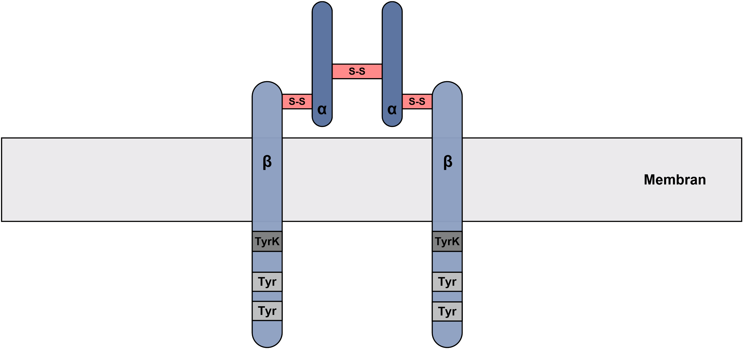 Aufbau des Insulinrezeptors